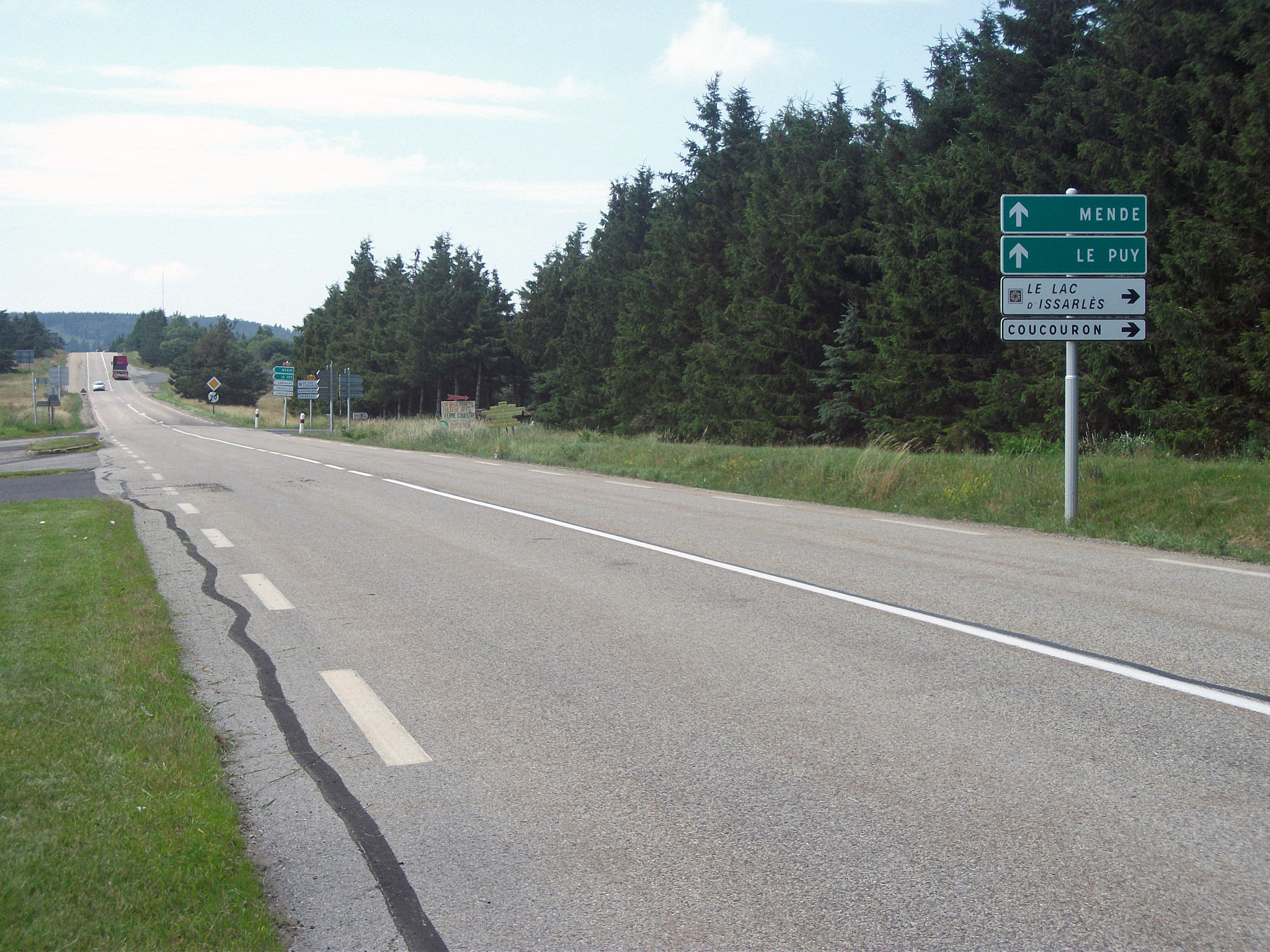 N 102 près de l'auberge de Peyrebeille, Rhône-Alpes ; direction Le Puy-en-Velay et Mende